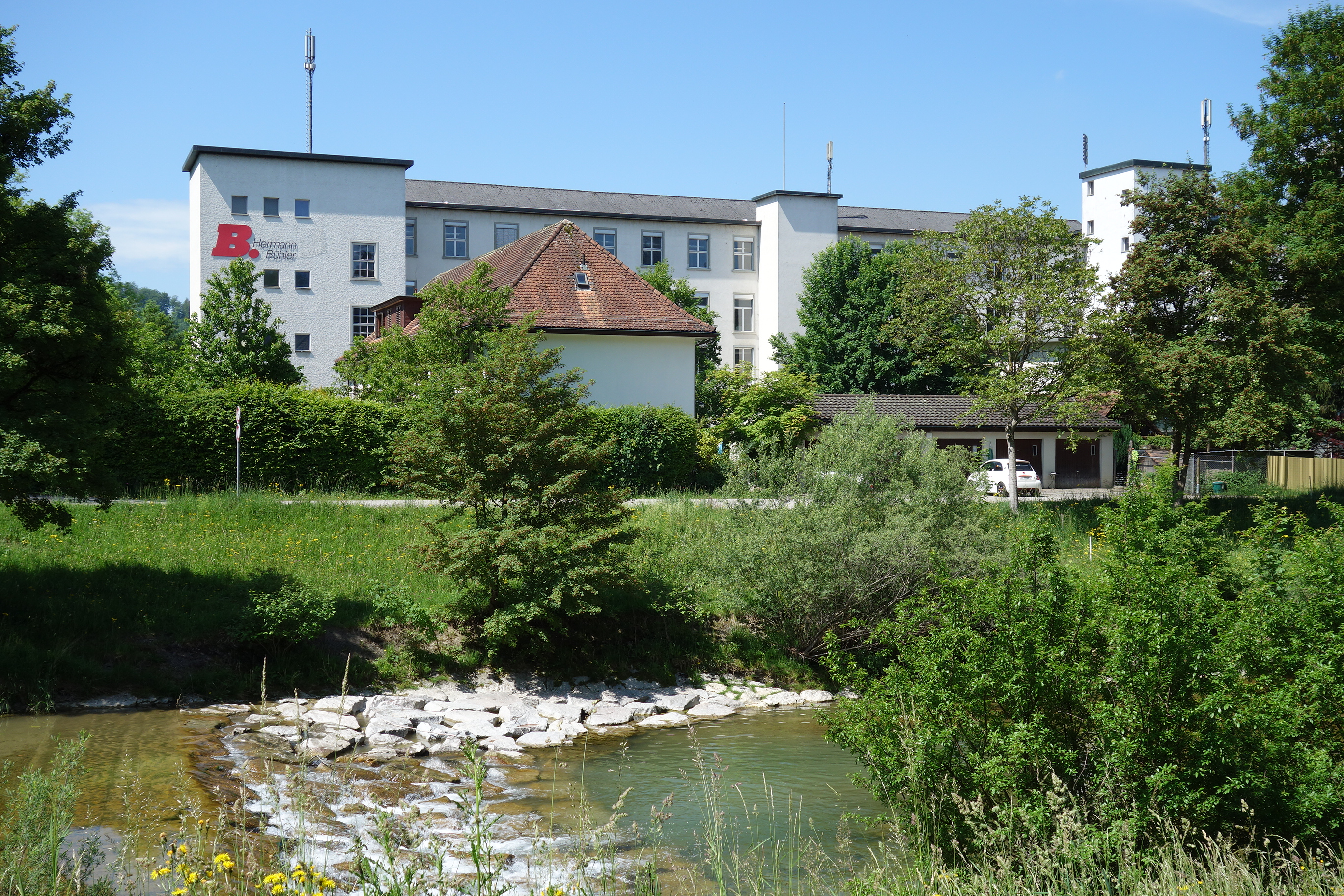 Spinnerei Sennhof, Illnau-Effretikon ZH, Schweiz